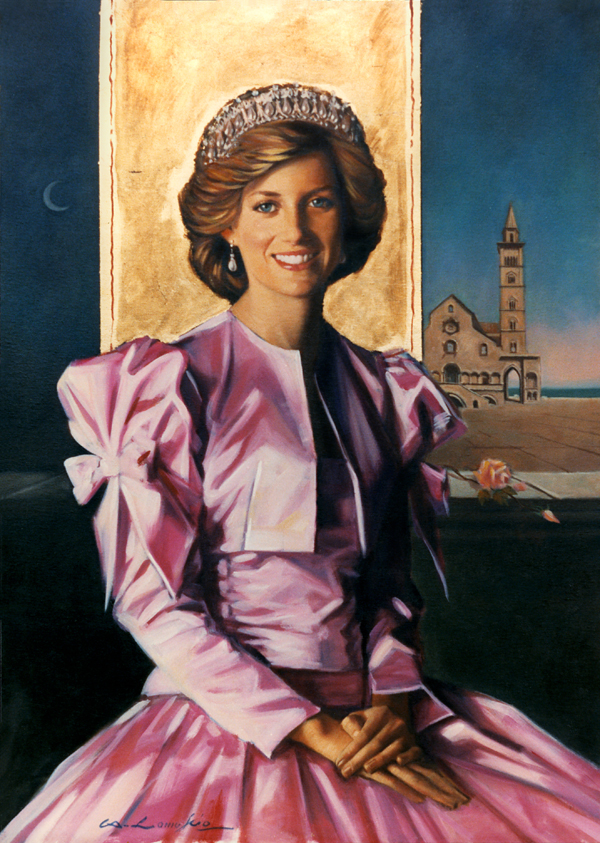 Lady Diana, olio su tela - opera dell'artista Giuseppe Antonio Lomuscio